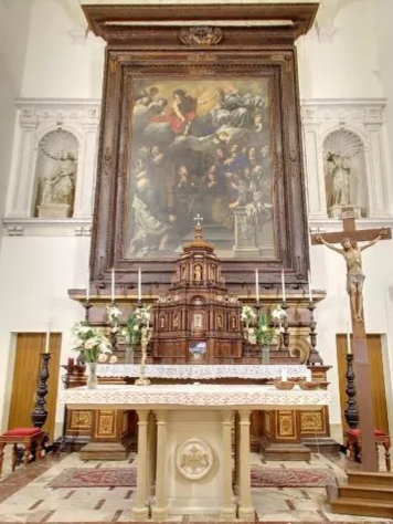 Presbiterio della Chiesa dei Cappuccini, con l'altare in pietra e la tela raffigurante l'elezione di Mattia all'apostolato del pittore monrealese Pietro Novelli. Olio su tela, 390x278 cm